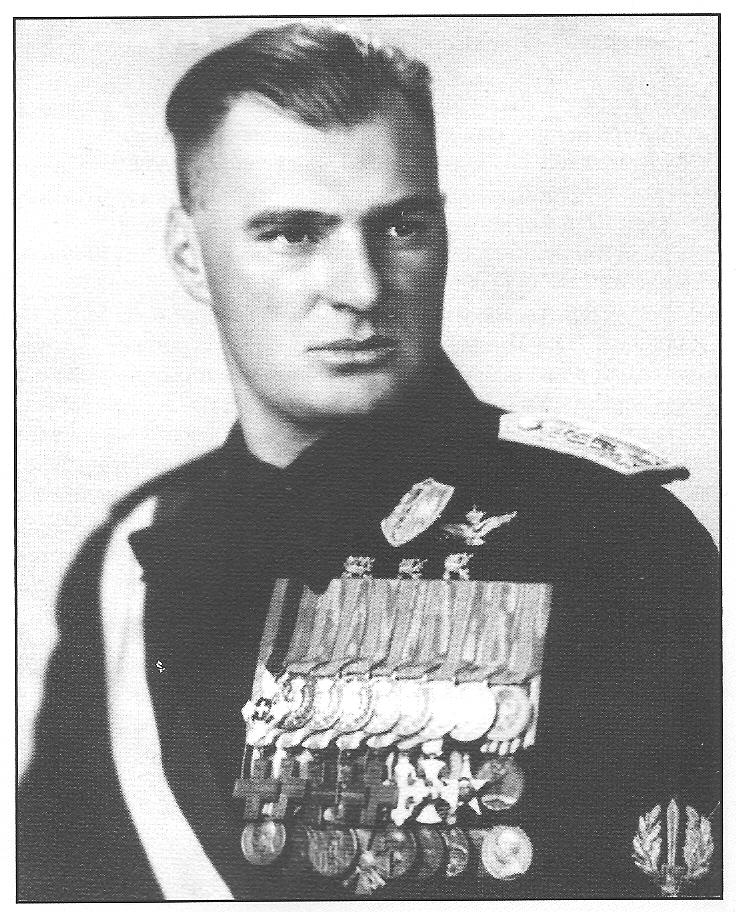 Militare, aviatore e politico italiano, segretario del Partito Nazionale Fascista e ministro nel governo Mussolini